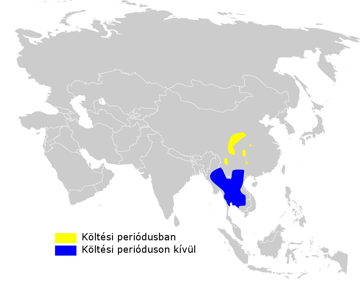 Seicercus omeiensis distribution map, based on